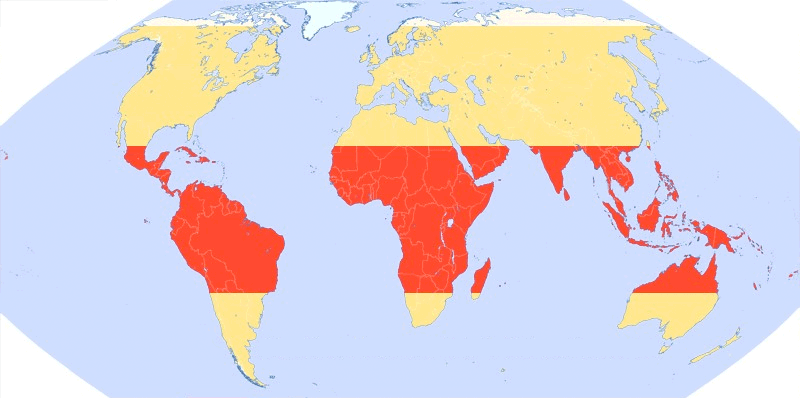 Die Beleuchtungs-(Klima)-zonen der Erde